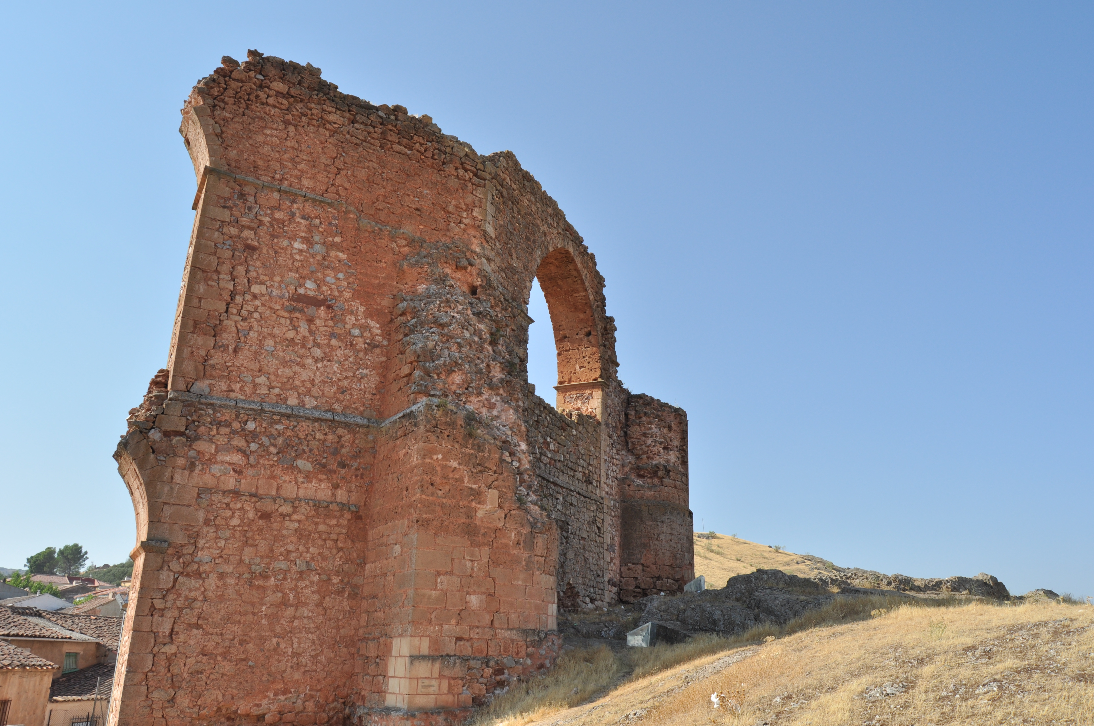 Alcaraz - 042